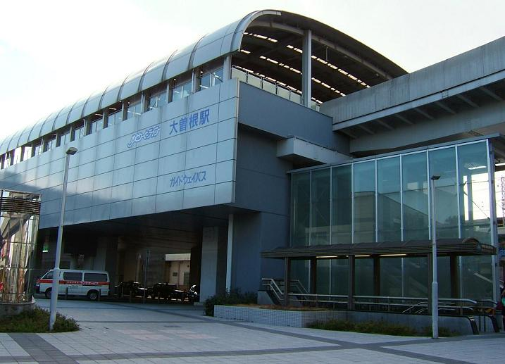 名古屋市東区東大曽根町東に所在する名古屋市営バスゆとりーとラインの大曽根駅。